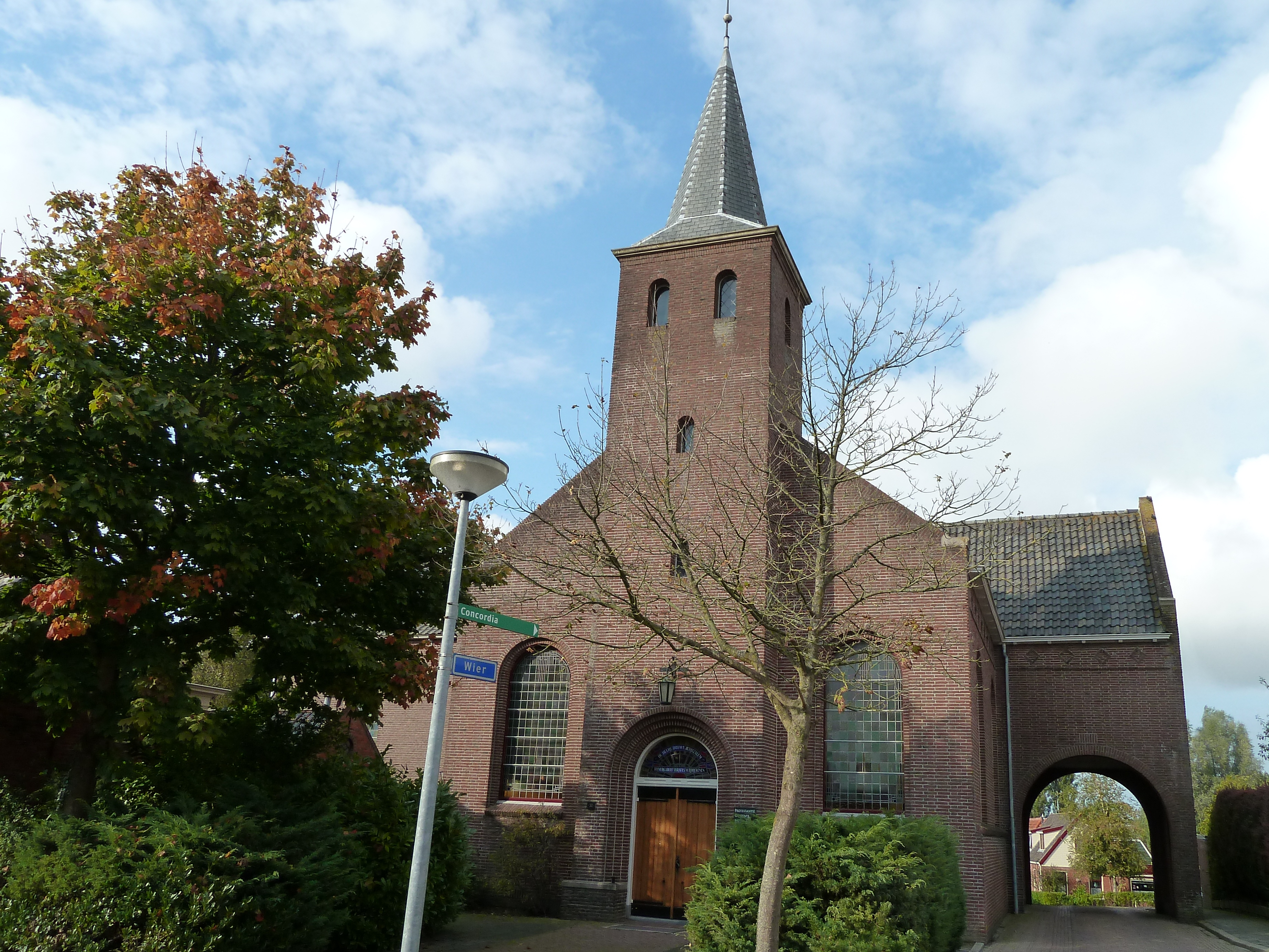 Gereformeerde zaalkerk van Baflo uit 1877. De transept dateert uit 1926.